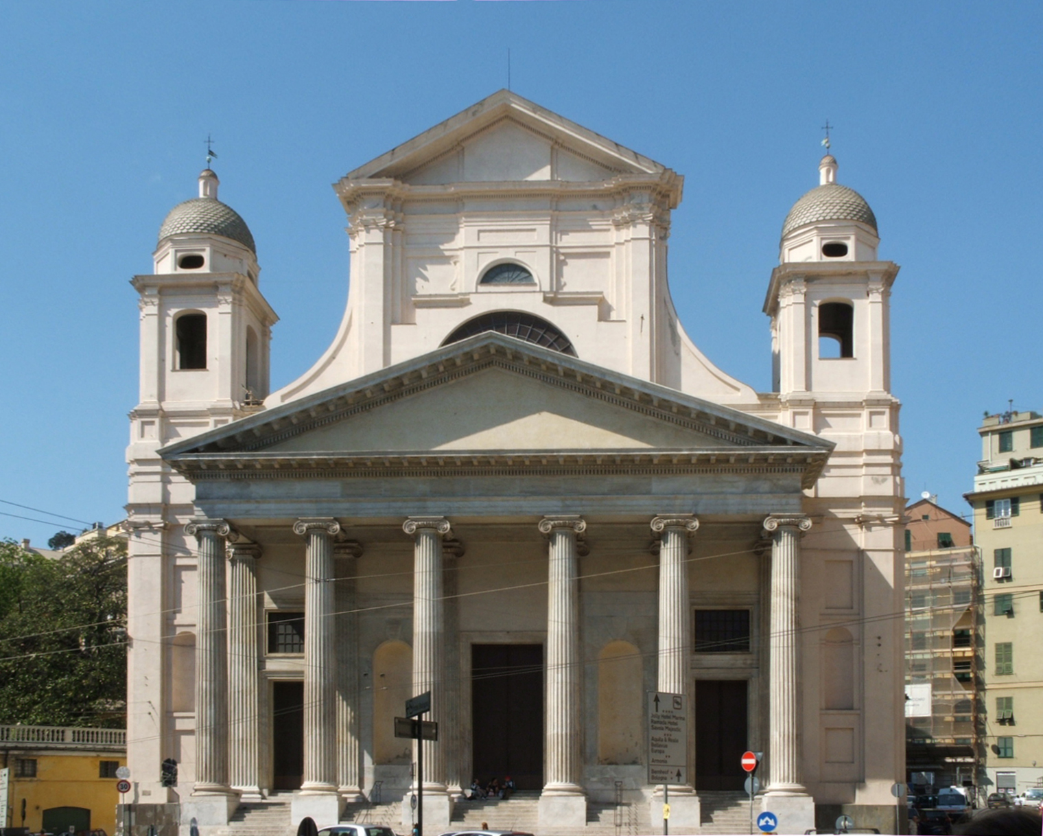 Carlo Barabino, la neoclassica facciata della basilica della Santissima Annunziata del Vastato (Genova) (ca. 1840).